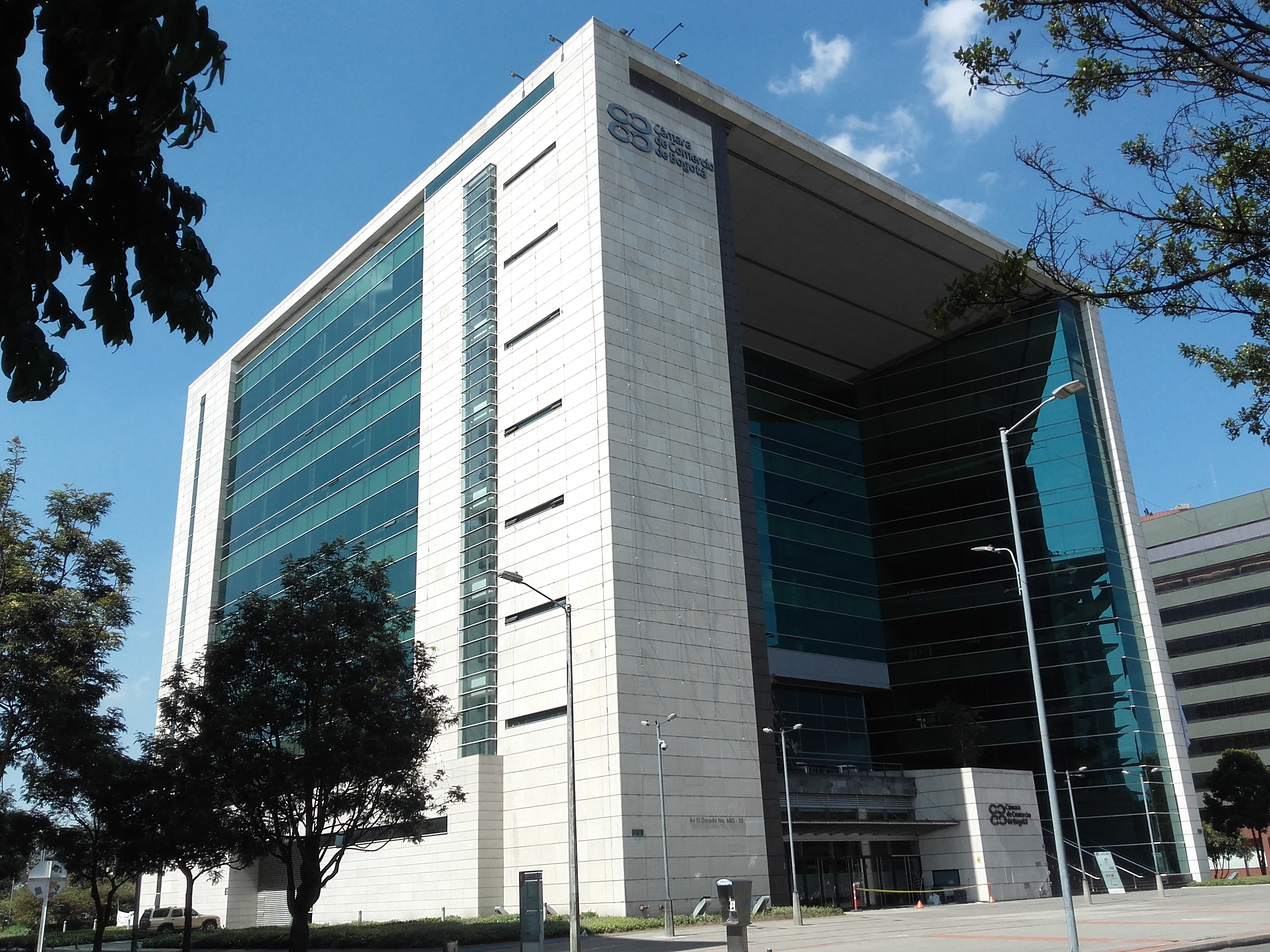 snnxnxjxnxnv